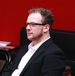 Steffen Bockhahn bei einer Pressekonferenz im Rostocker Theaterzelt.